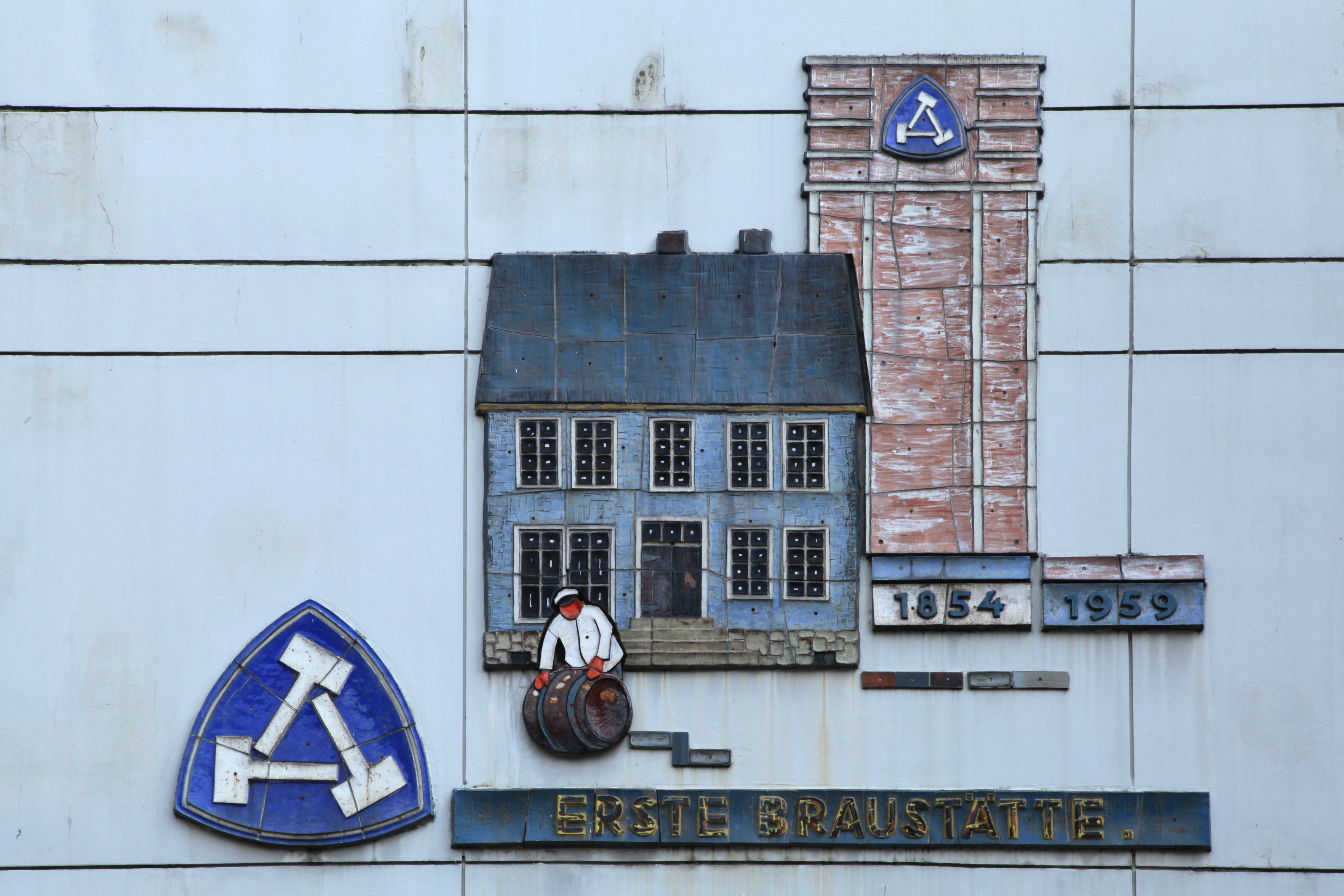 Denkmal an die erste Braustätte der Schlegel-Brauerei in Bochum